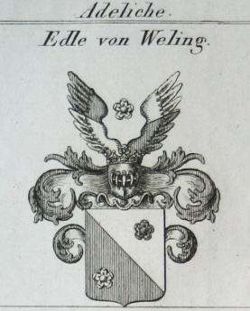 Wappen der bayerischen Adelsfamilie der Edlen von Weling, nobilitiert 1816, ausgestorben 1872